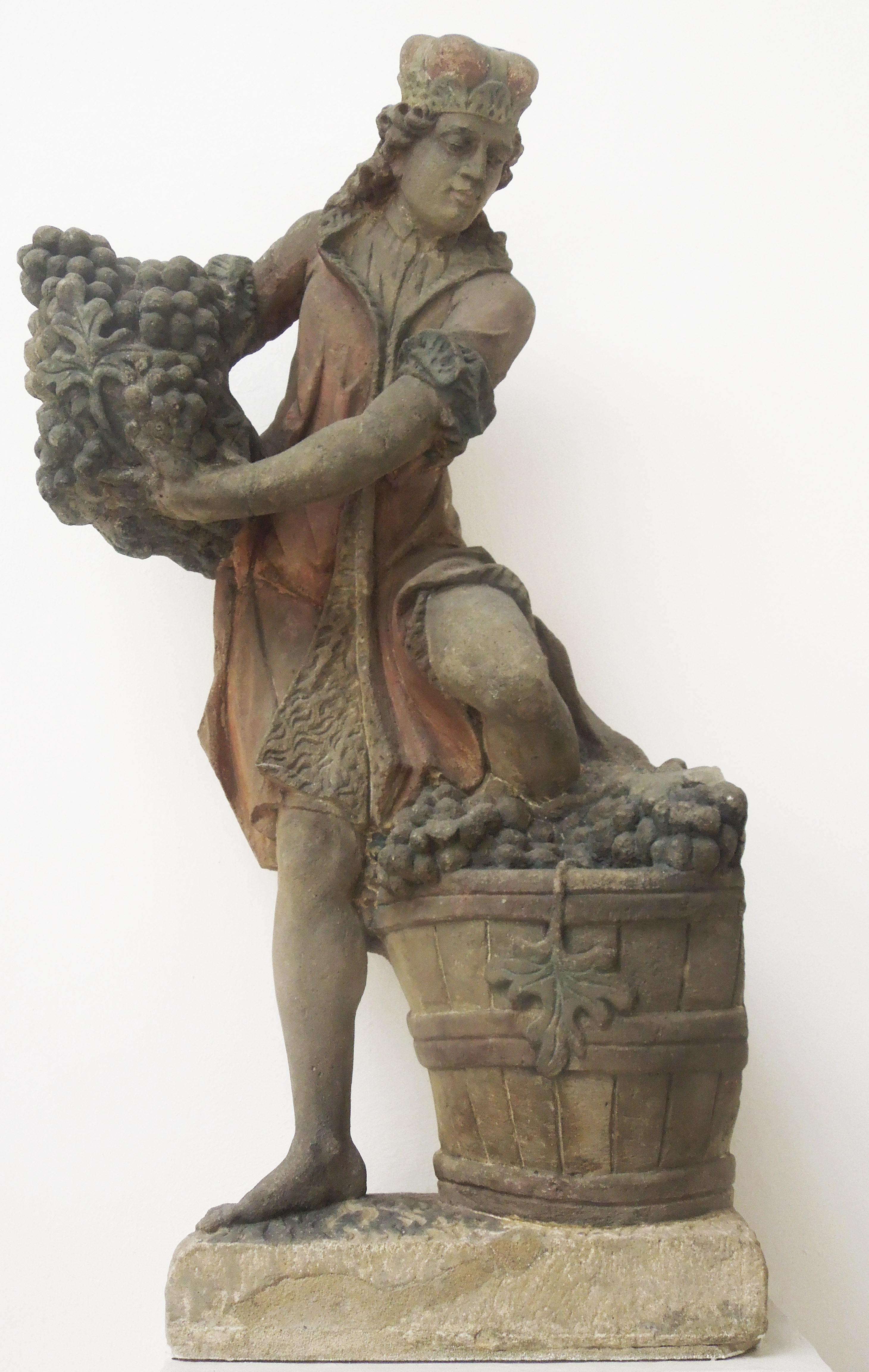 Jan Brokoff – Sv. Václav jako vinař, Praha, pískovec z polychromii